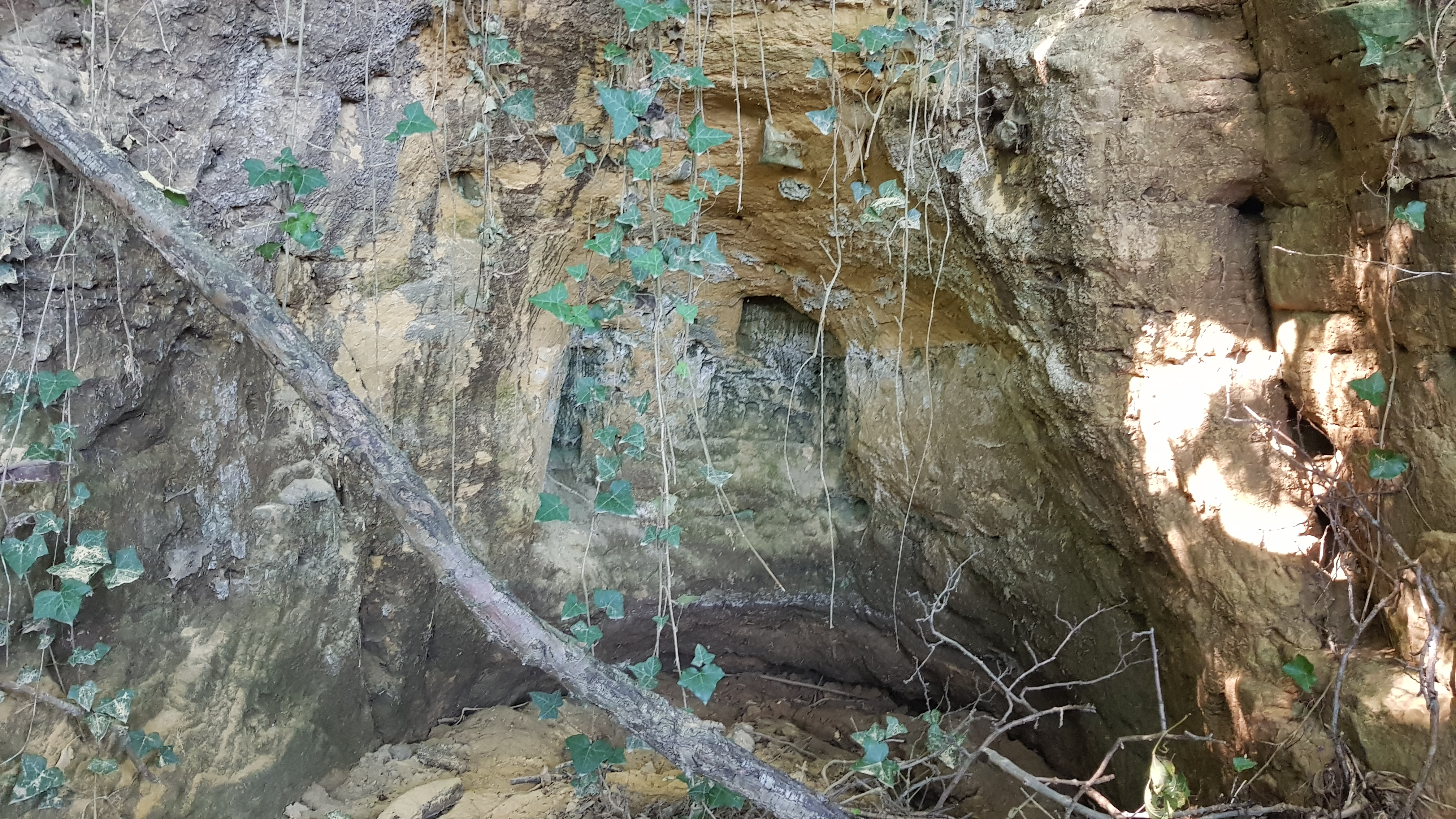 Scheuldergroeve III, Scheulder, Nederland